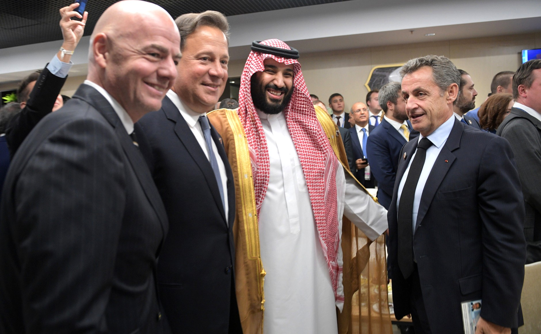 В перерыве матча Президент России Владимир Путин кратко пообщался с иностранными гостями, прибывшими на Чемпионат мира по футболу 2018 года